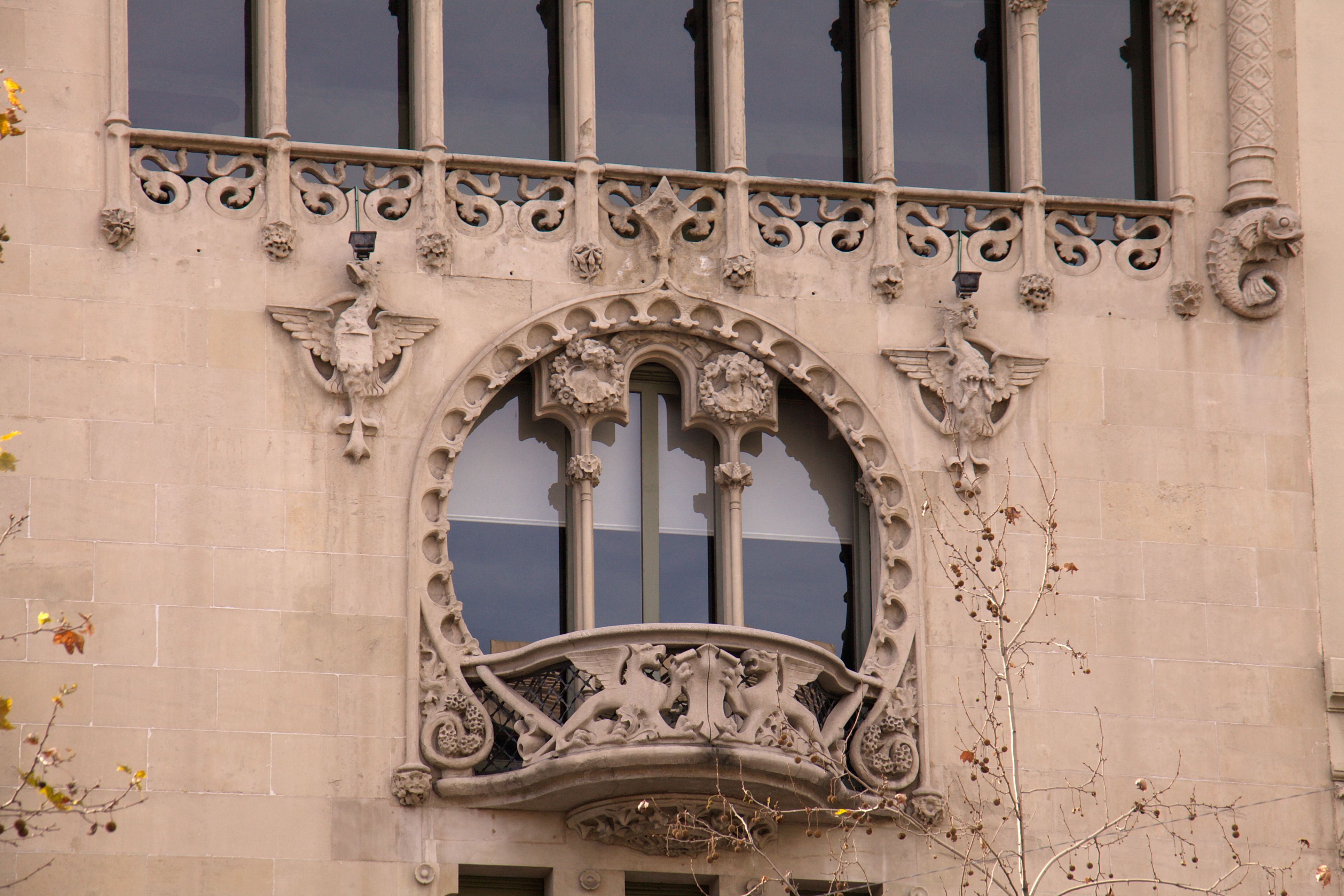 Casa Lleó Morera (Barcelona). Finestra del segon pis